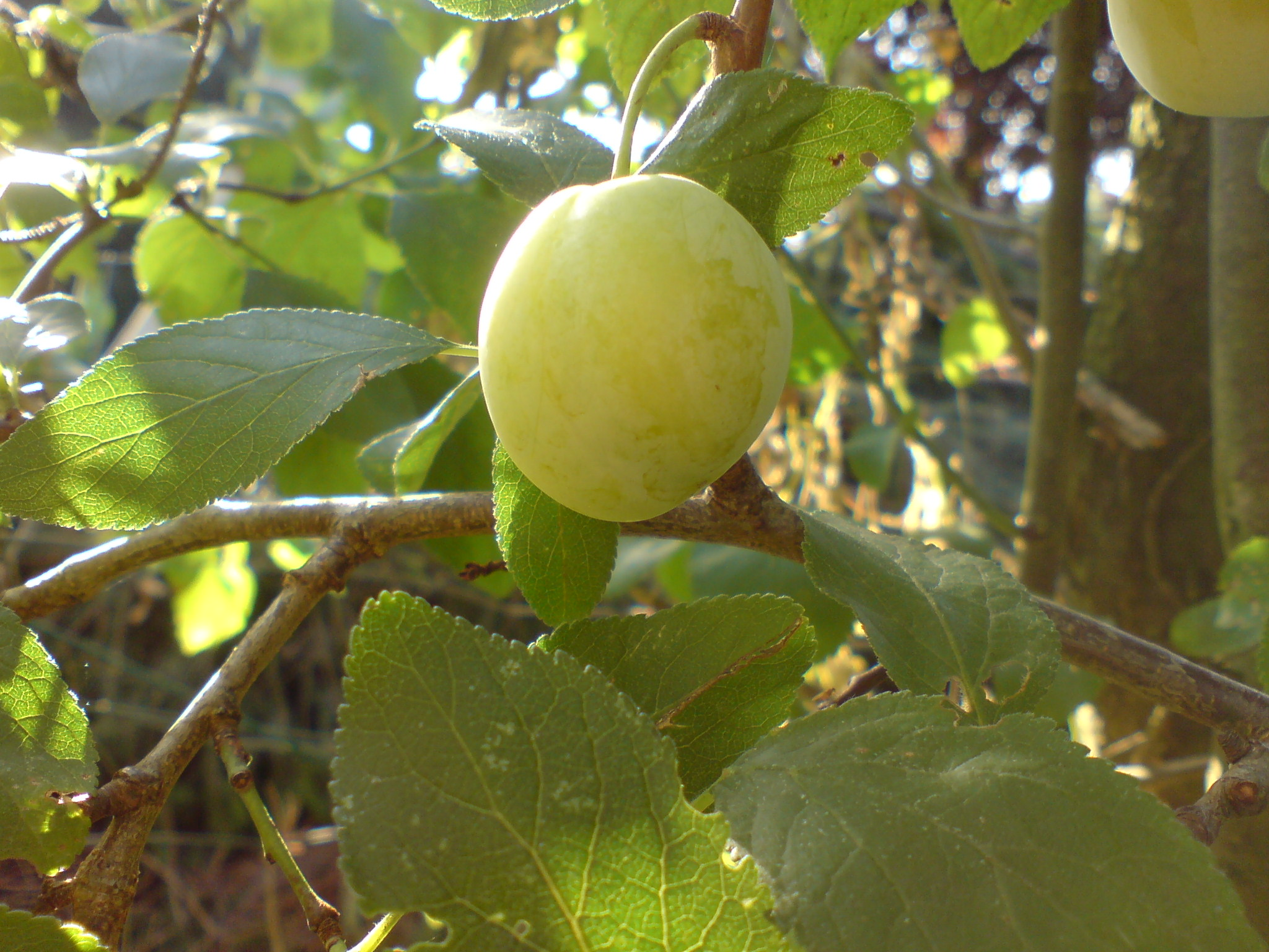 Mirabelle de Septembre oder auch Parfume de Septembre, eine spät reifende französische Mirabellensorte.